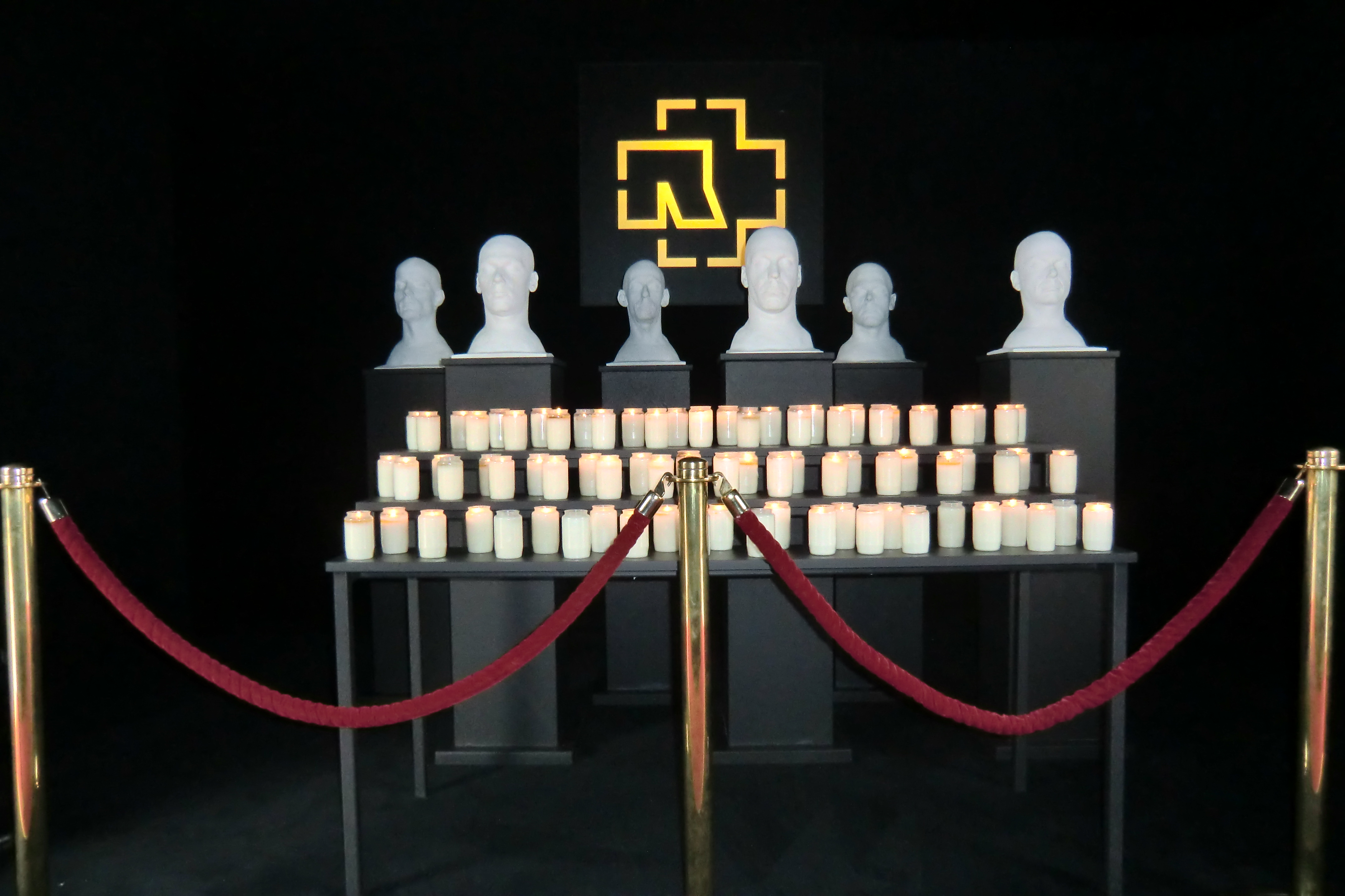 Im Mausoleum der Band Rammstein vor der O2 World in Berlin am 26.11.2011